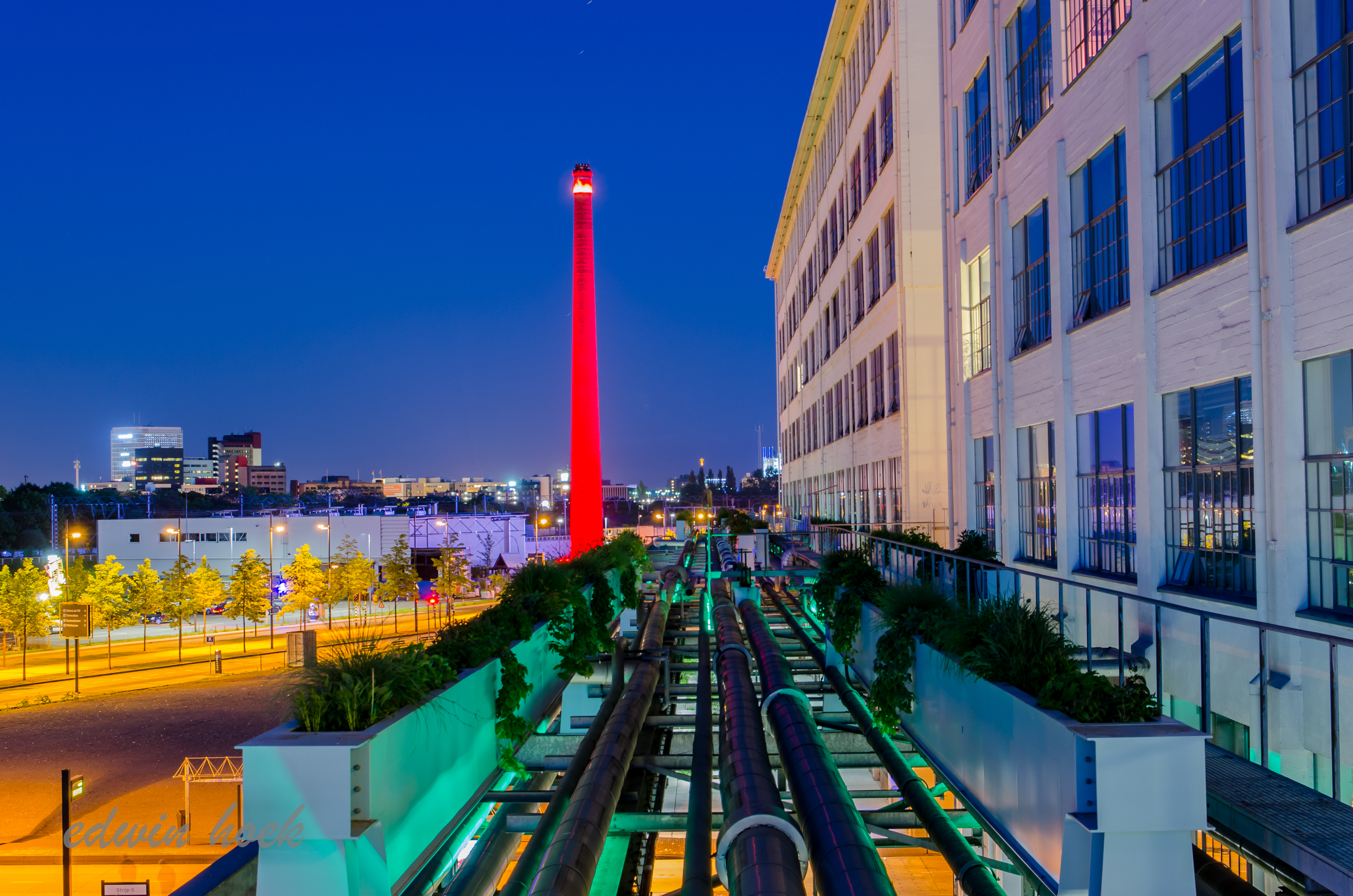 Lichtkunst rondom de leidingstraat op Strijp-S, met in de achtergrond het kunstwerk Fakkel van lichtarchitect Har Hollands.